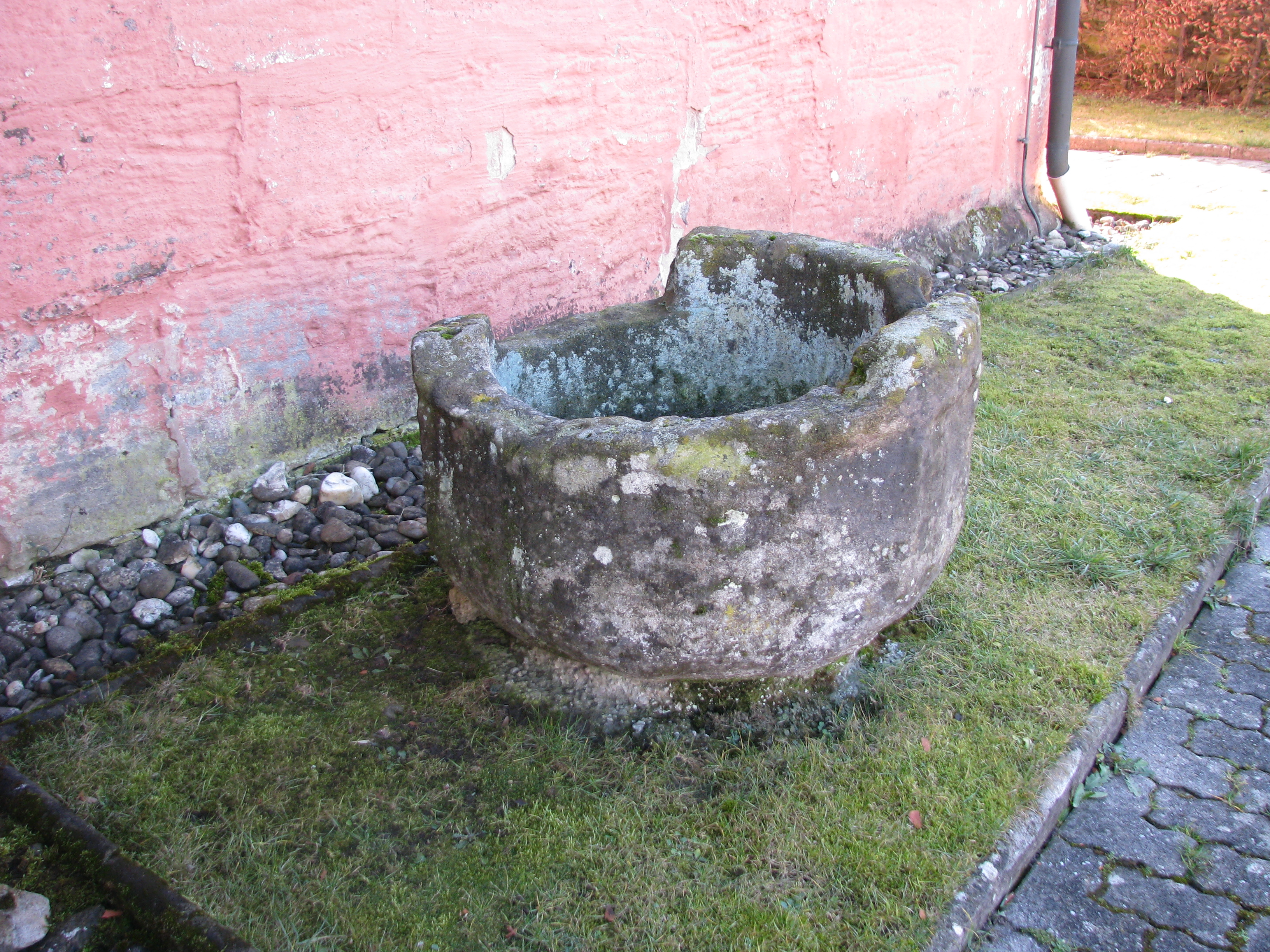 Mindorf, Ortsteil von Hilpoltstein im mittelfränkischen Landkreis Roth, Kath. Kirche St. Stephan